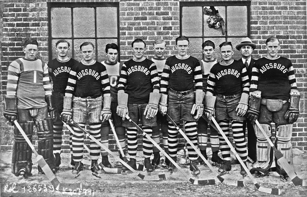 US-amerikanische Eishockey-Olympiamannschaft 1928; v.l.n.r. Georges Malsed, Oscar Hansen, Emil Hansen, Gordon Schaffer, Julius Hansen, Willard Falk, Lewis Hansen, Charles Warren, Joe Hansen, coach Nick Kahlen und Wallace Swanson